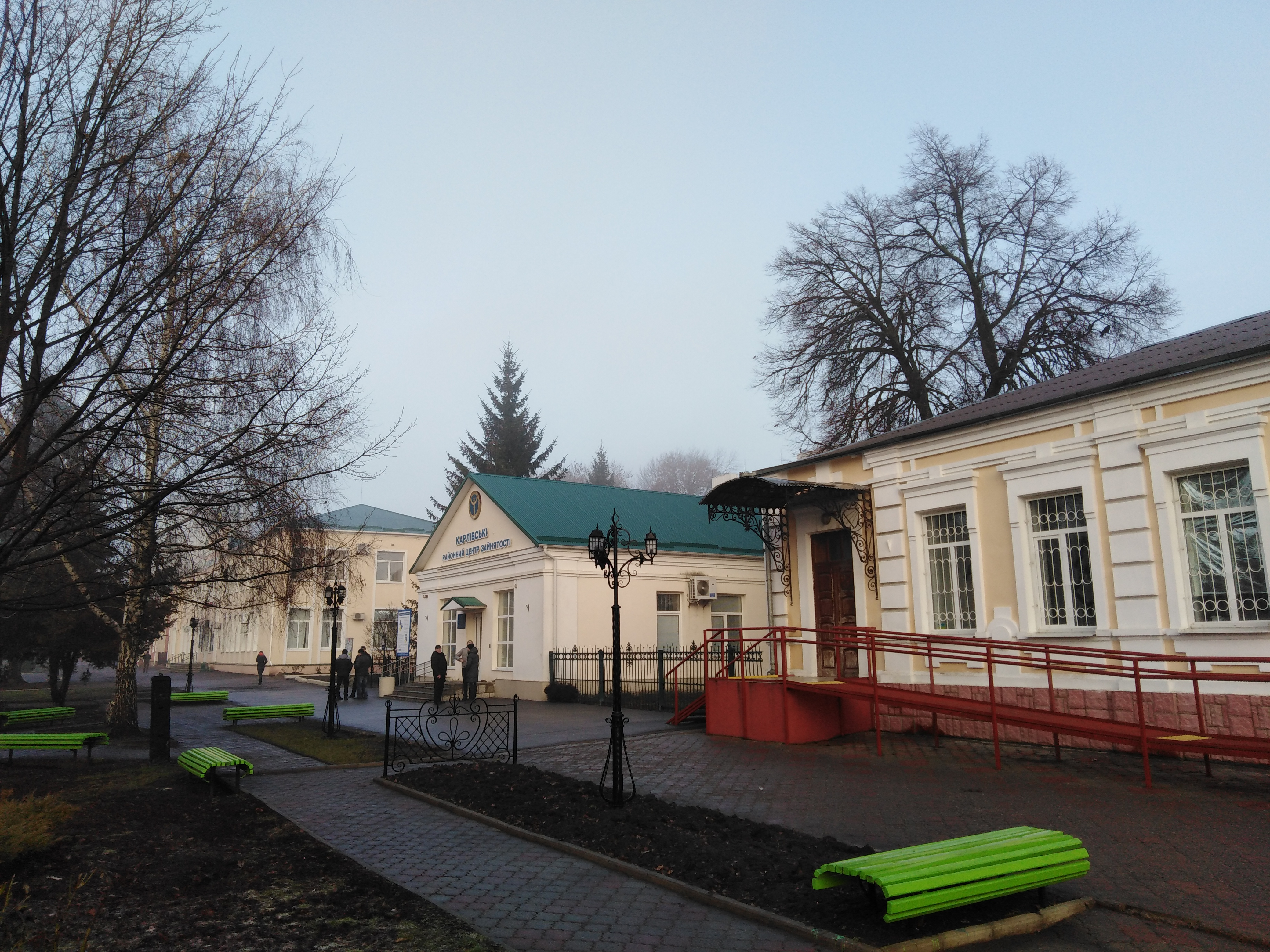 Україна, Полтавська область, м. Карлівка. Районний центр зайнятості. Вулиця Полтавський Шлях.